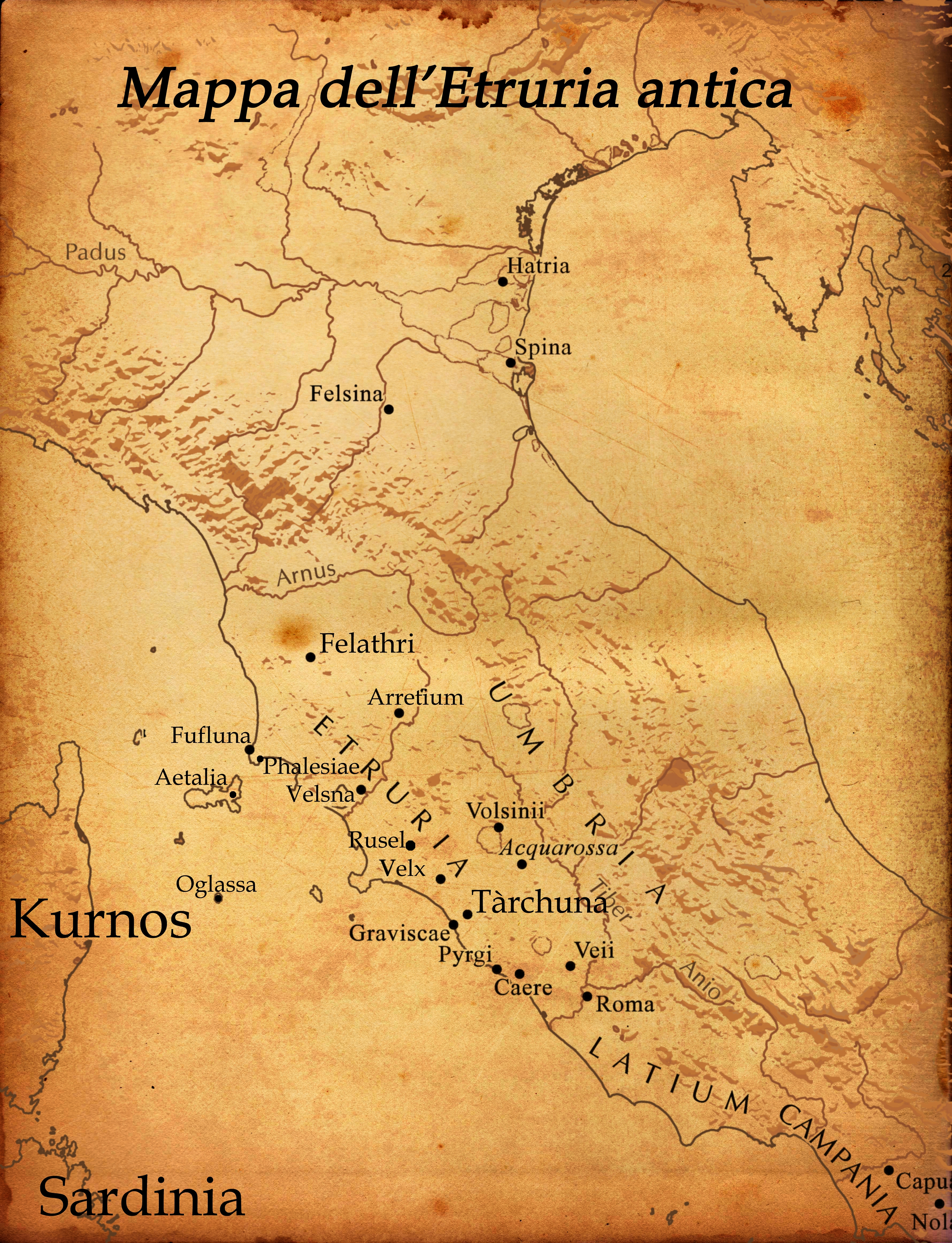 Mappa dell'Etruria antica descritta nel libro Alxuvaisera, di Mauro Ticciati